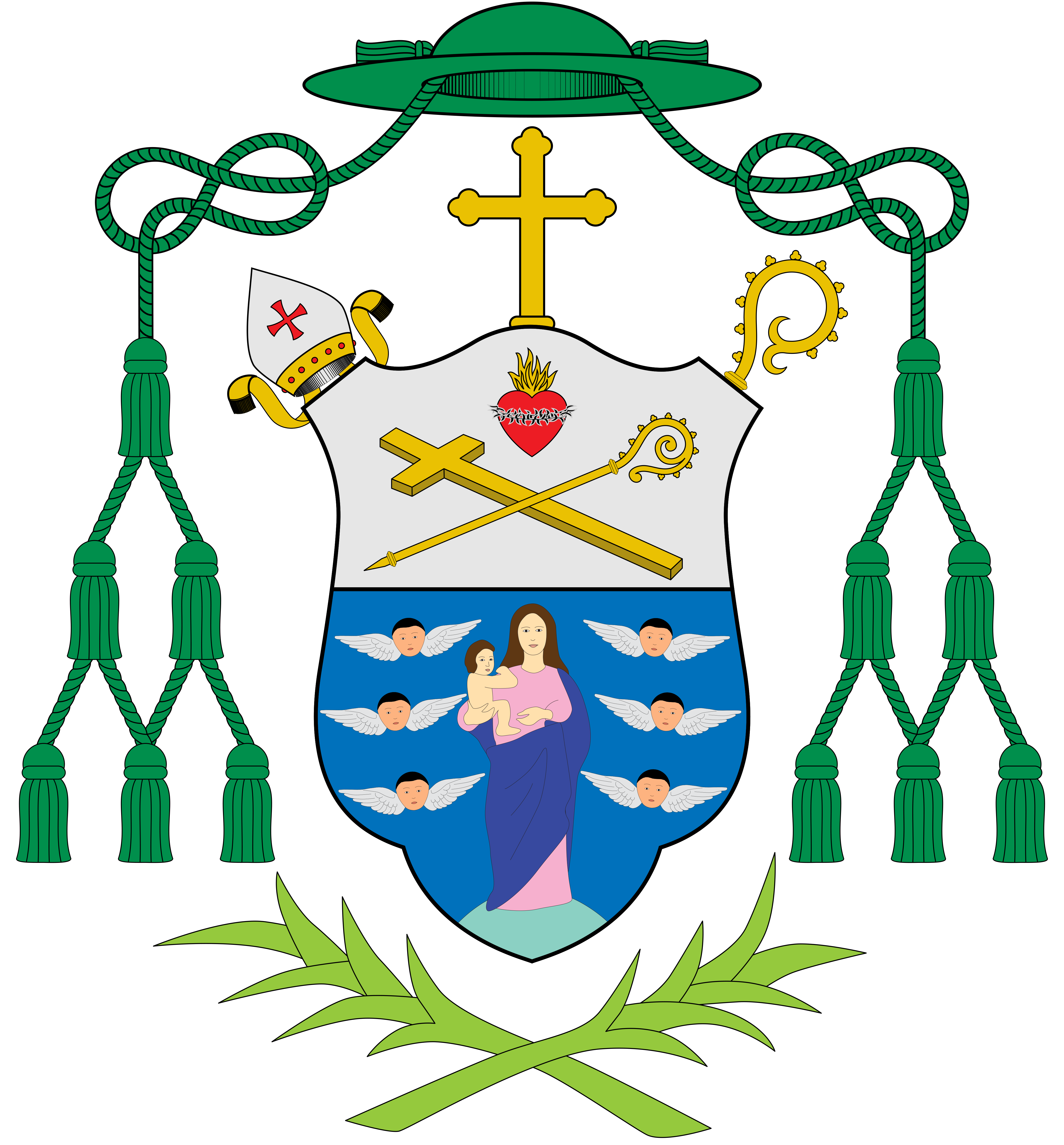 Escudo del Gobierno Eclesiástico de la Diócesis de León, Nicaragua